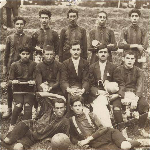 Afghanistan national football team in 1920s - in Kabul, Afghanistan